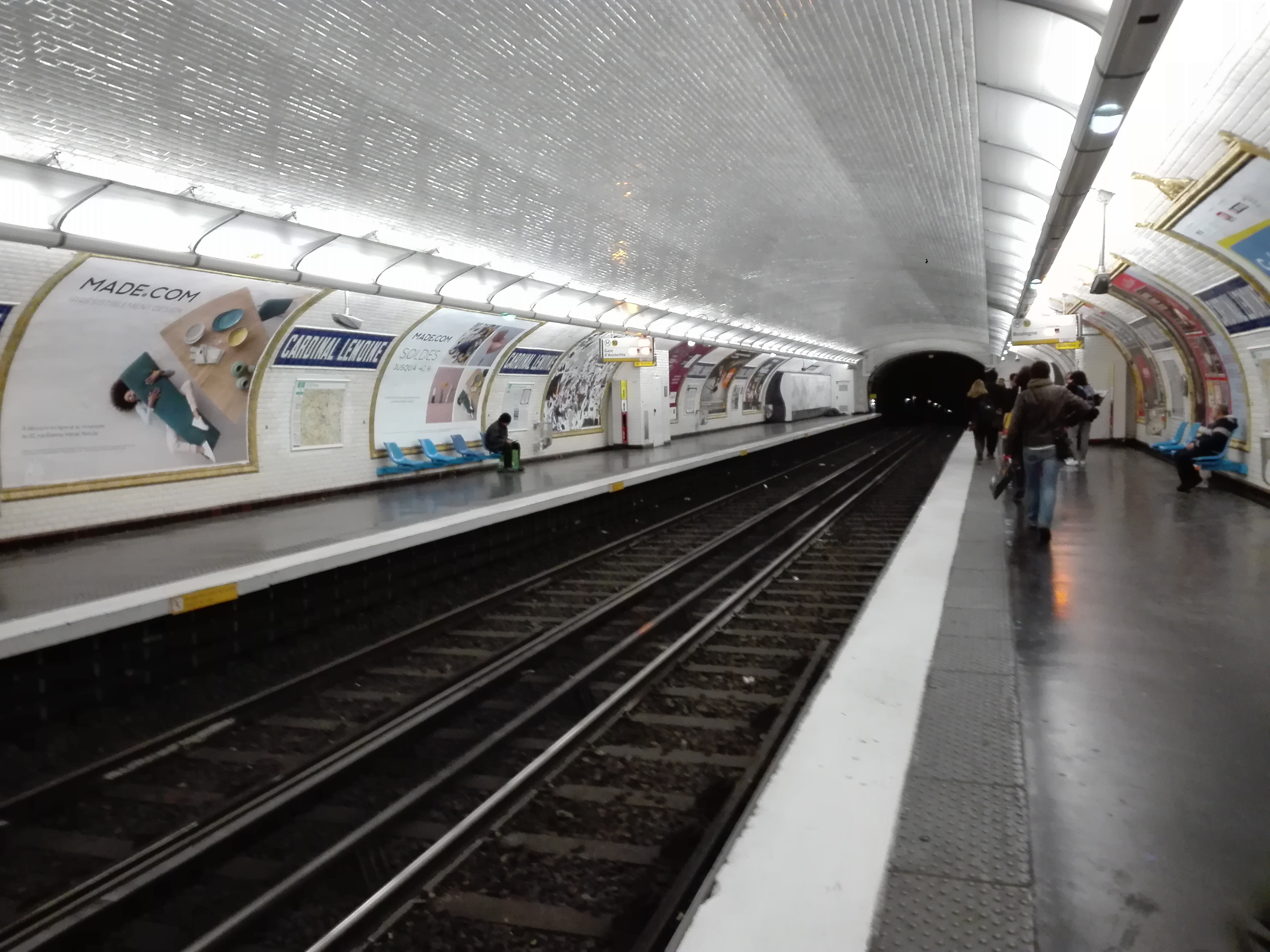 Quais de la station Cardinal Lemoine de la ligne 10 du métro de Paris.